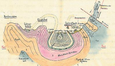 Forschungsgebiet Gschliefgraben nach Gustav Adolf Koch